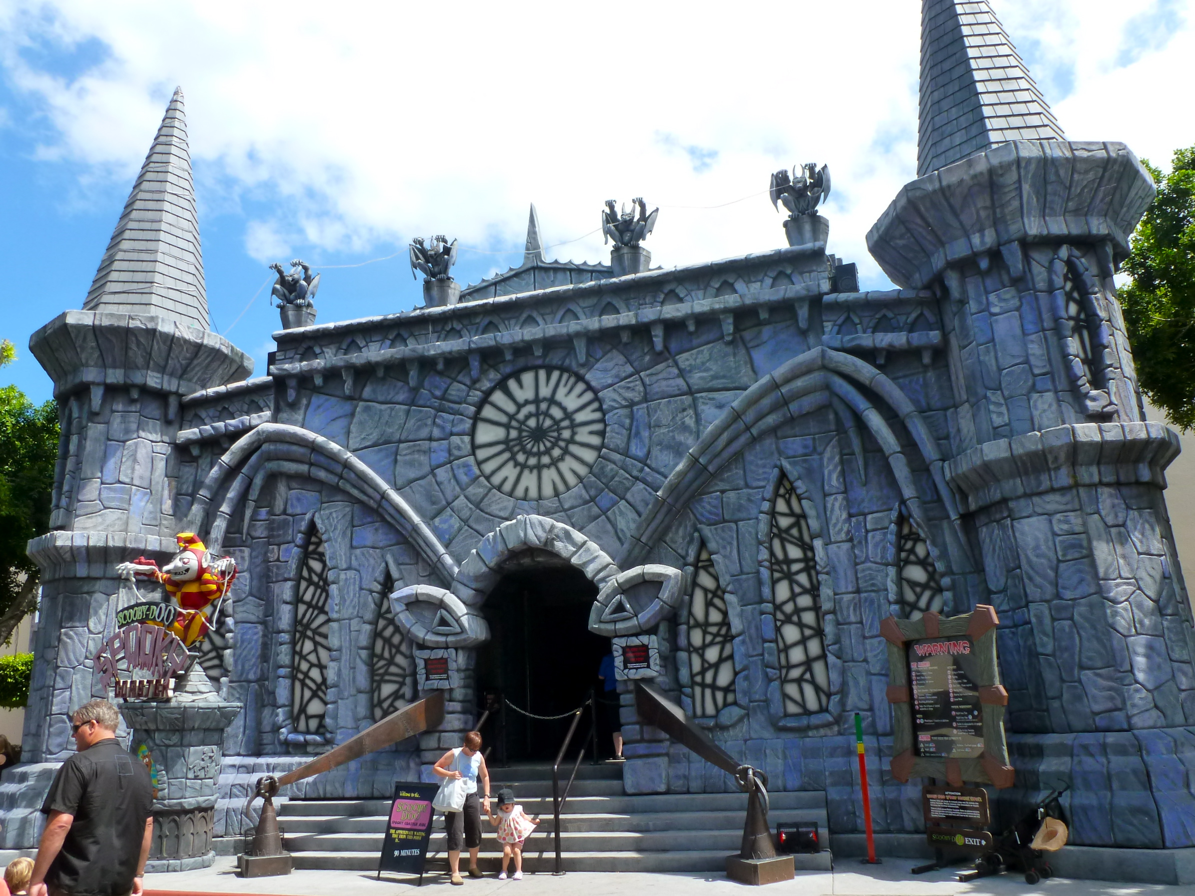 Movieworld